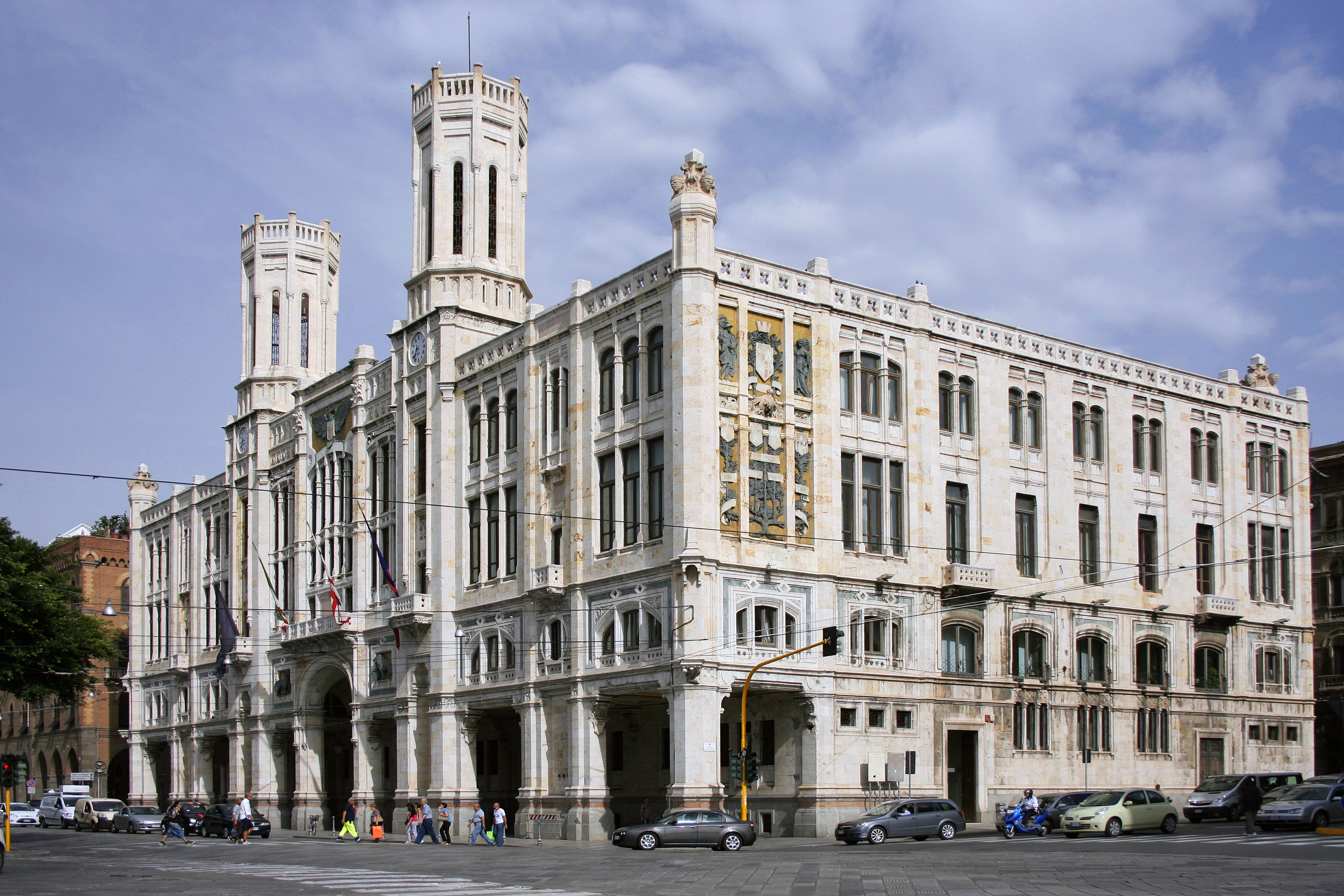 Palazzo Civico Ottone Baccaredda, Cagliari